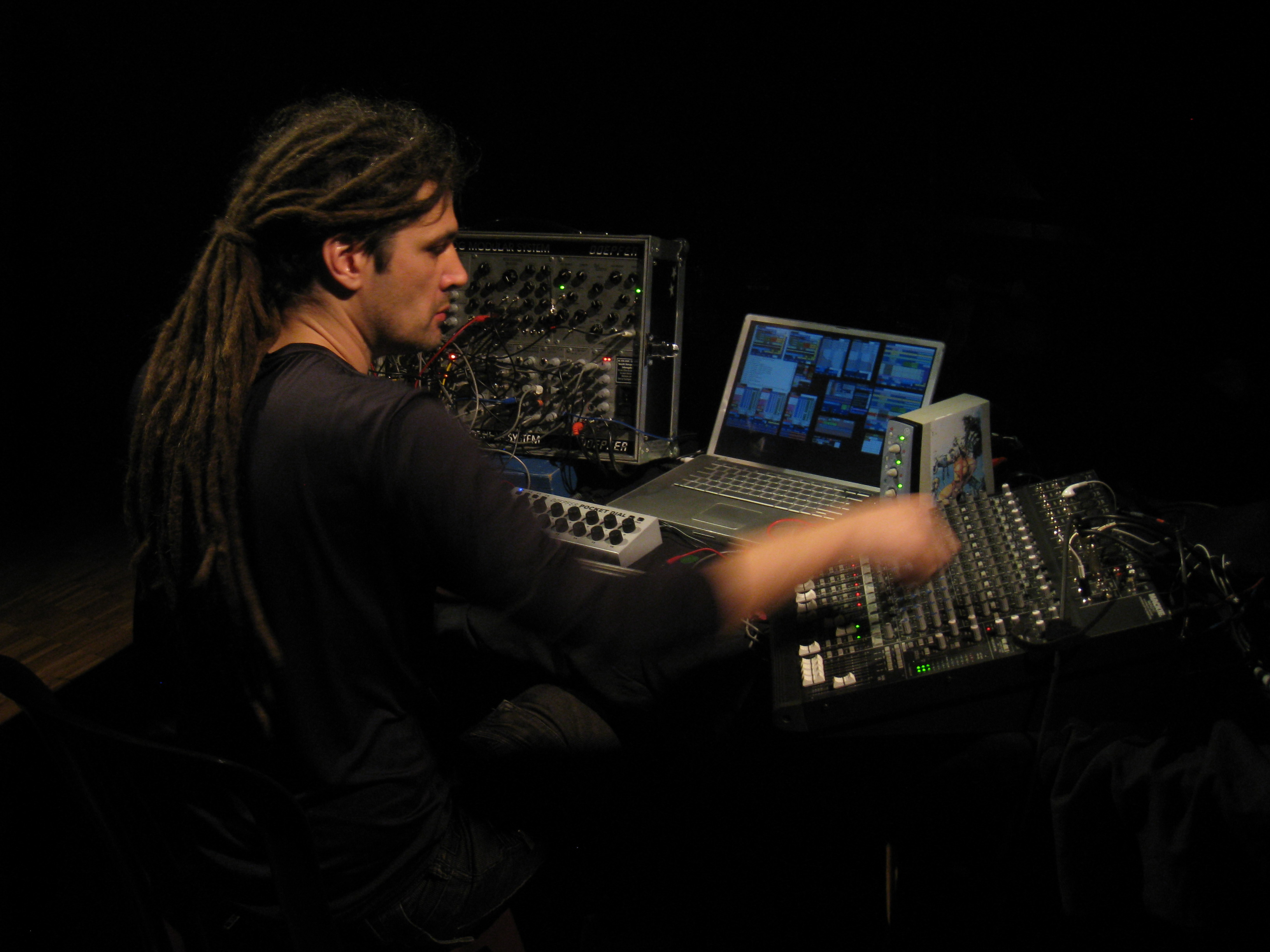 Robert Piotrowicz @ LUFF 2010